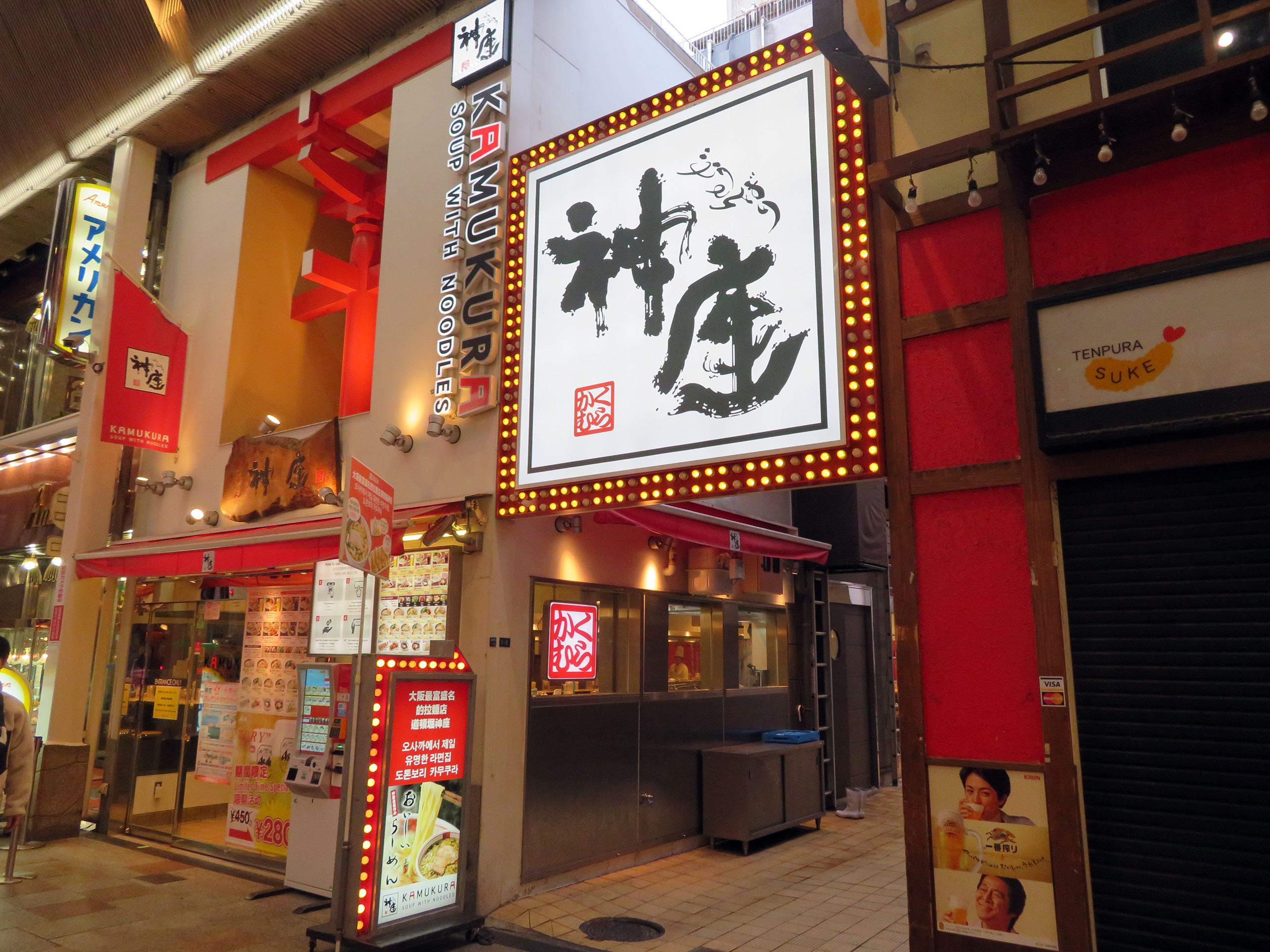 神座道頓堀店を撮影。